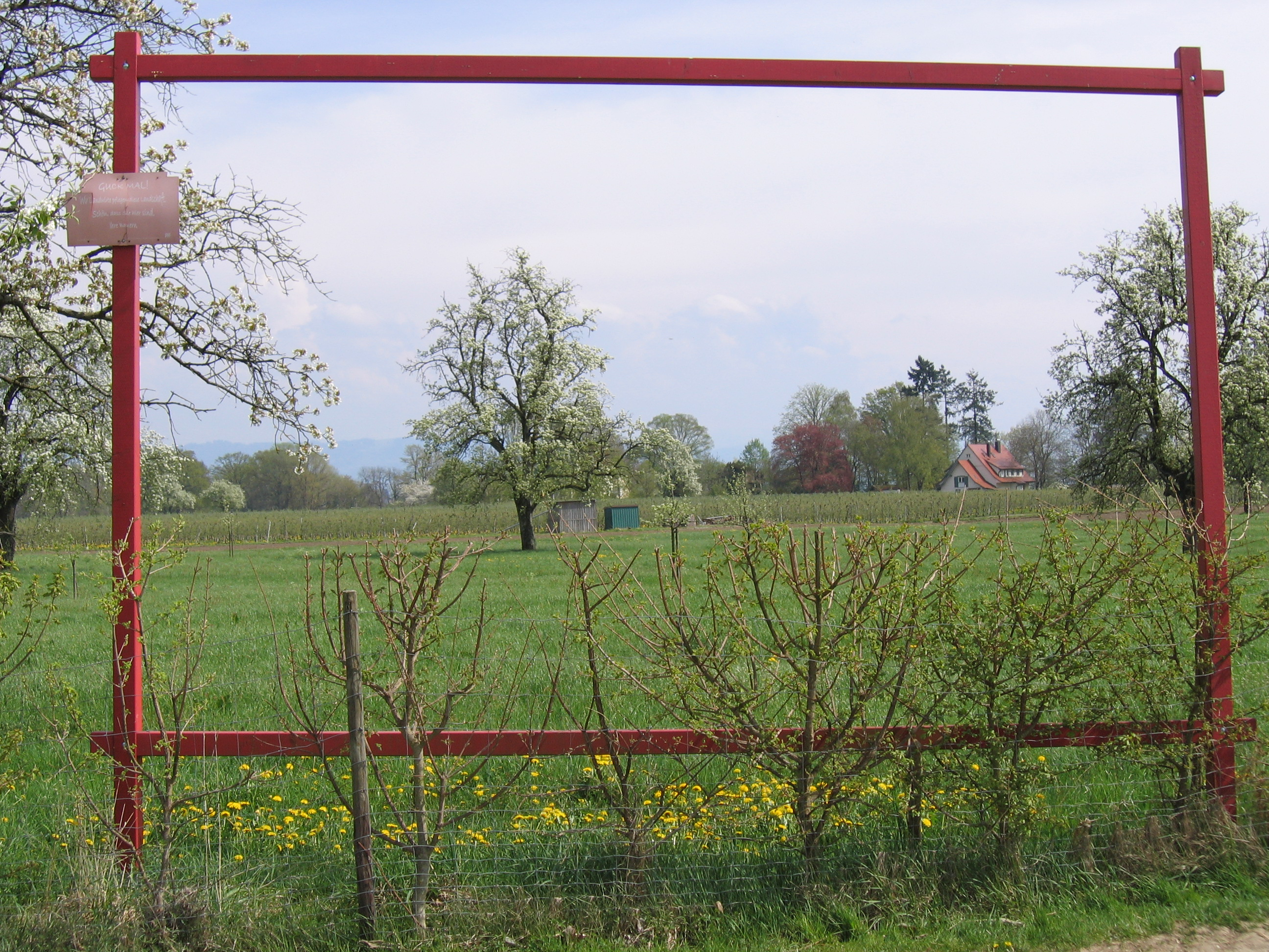 Deutschland - Baden-Württemberg - Bodenseekreis - Kressbronn am Bodensee - Ortsteil Tunau: "Guck-mal-Rahmen" am Fuß-/Radweg nach Schnaidt